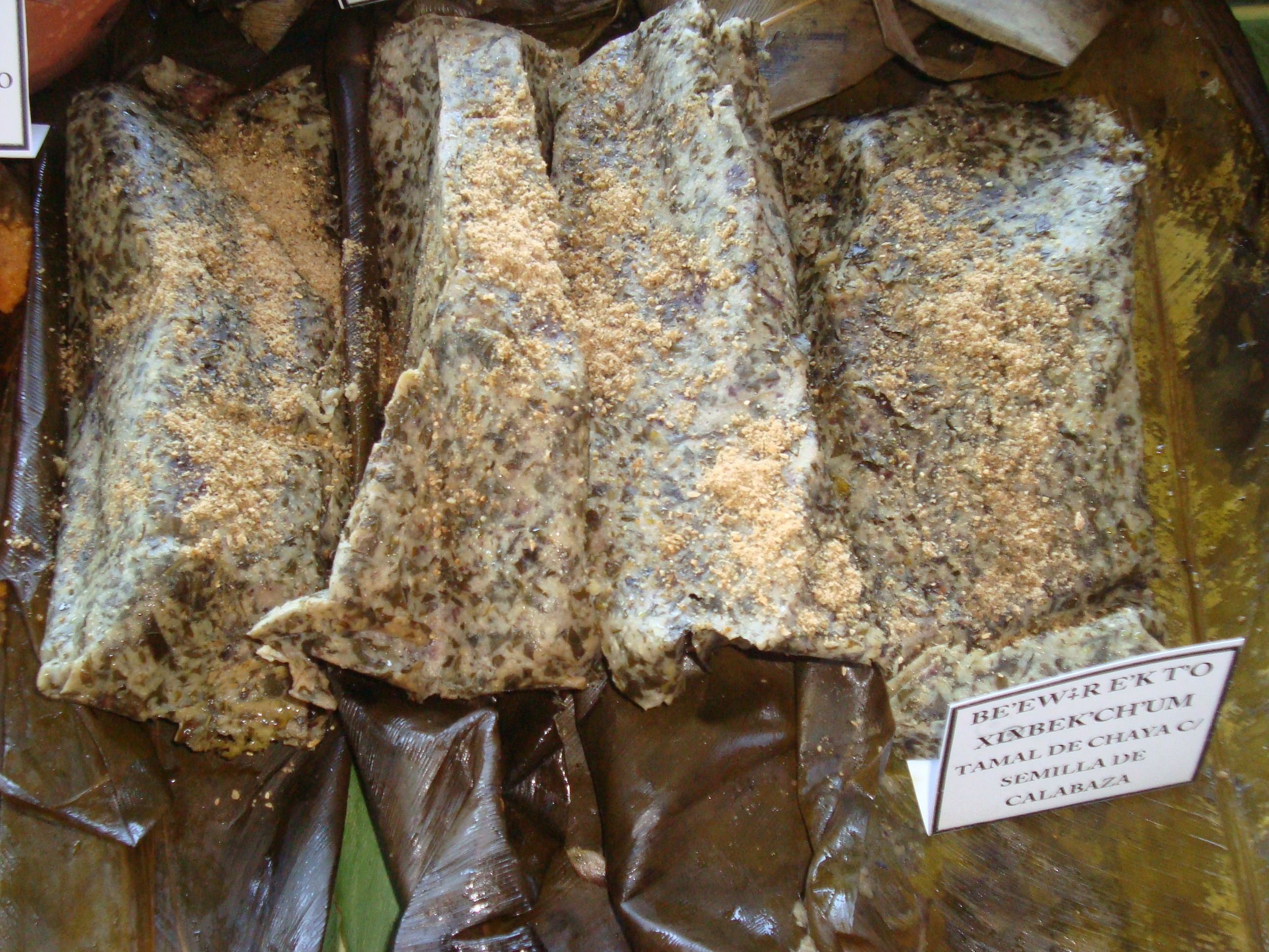 Tamales de chaya, platillo indígena chontal, típico de la gastronomía del estado de Tabasco, México.